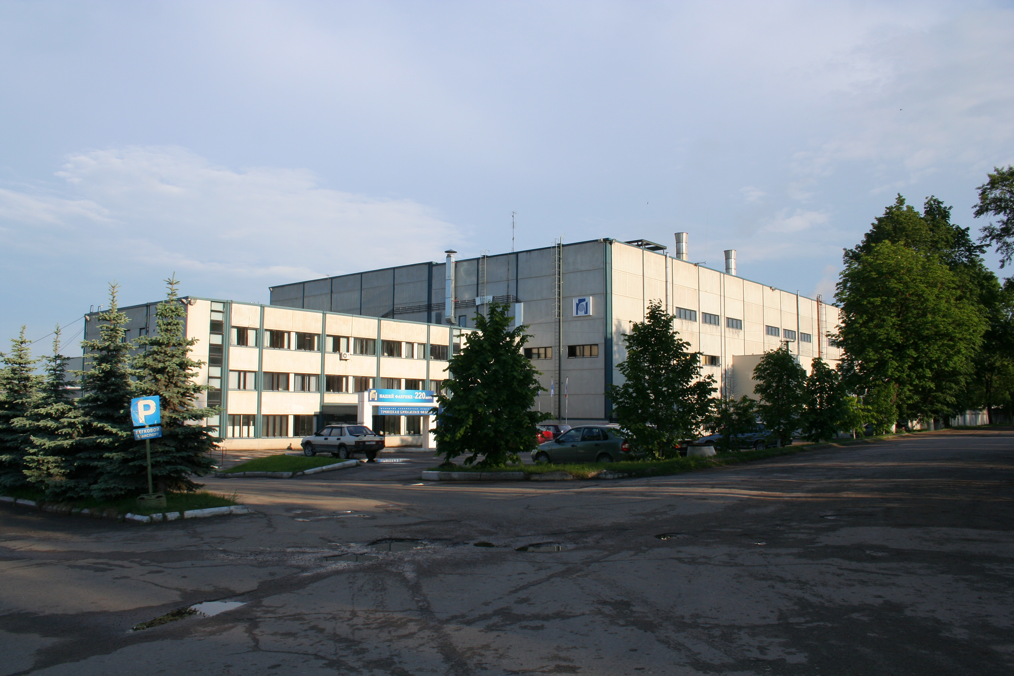 Stadt Kondrowo, Oblast Kaluga, Russland. Papierfabrik.